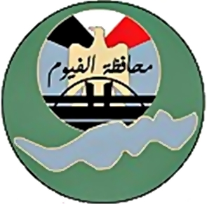 شعار محافظة الفيوم